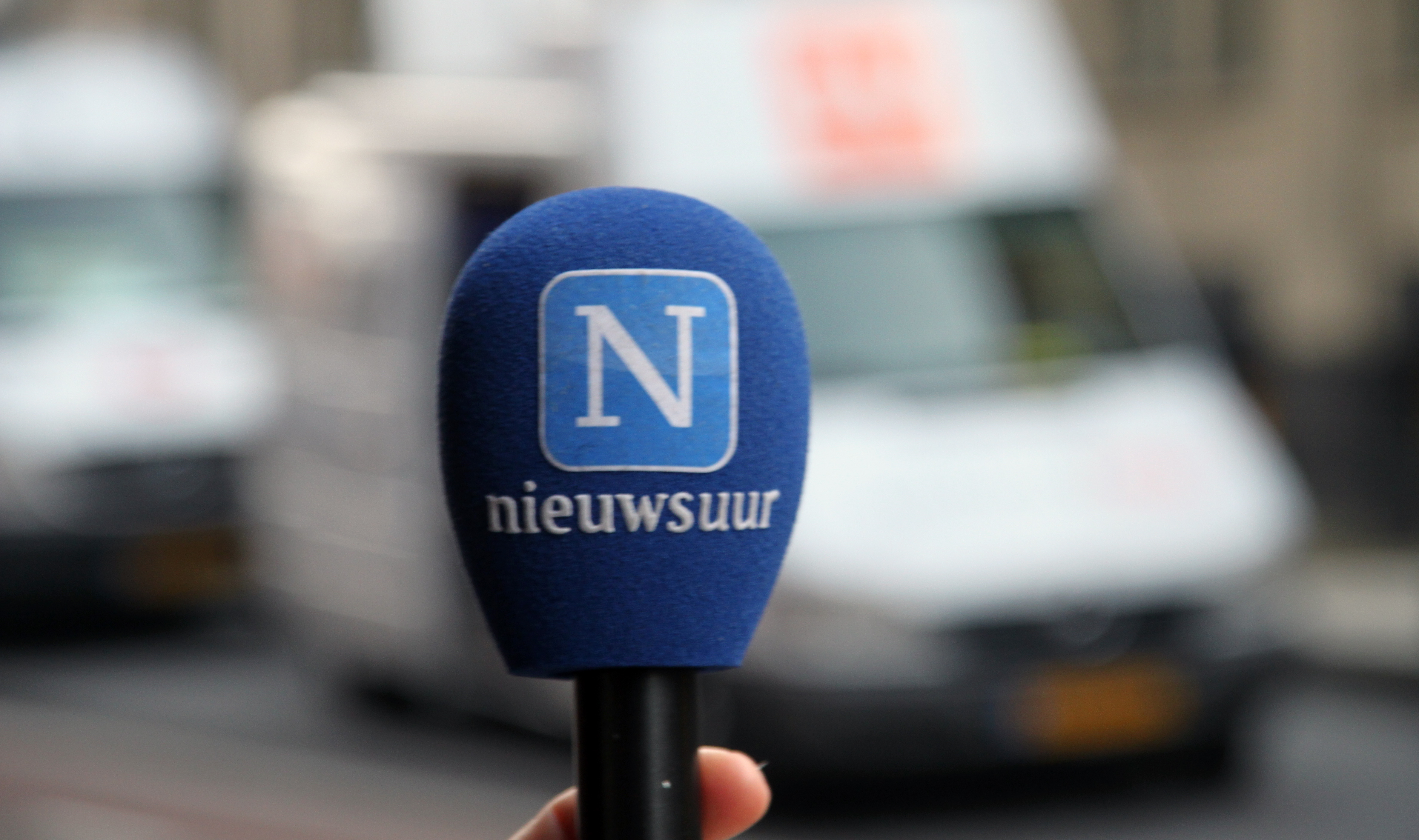 Microfoon met Nieuwsuur-logo. Op de achtergrond een straalwagen van 1Vandaag.